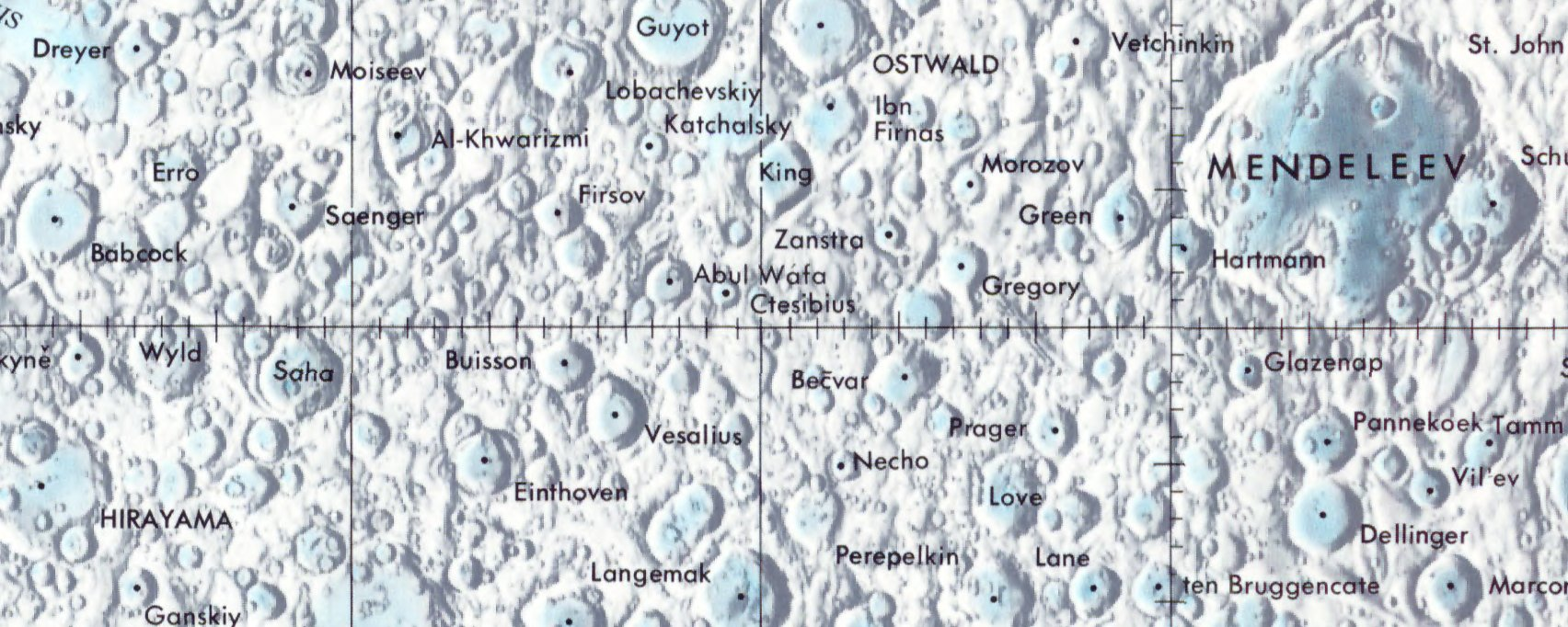 Cráter lunar Abul Wafa. Localización. (Lunar Chart LPC1. Second Edition)